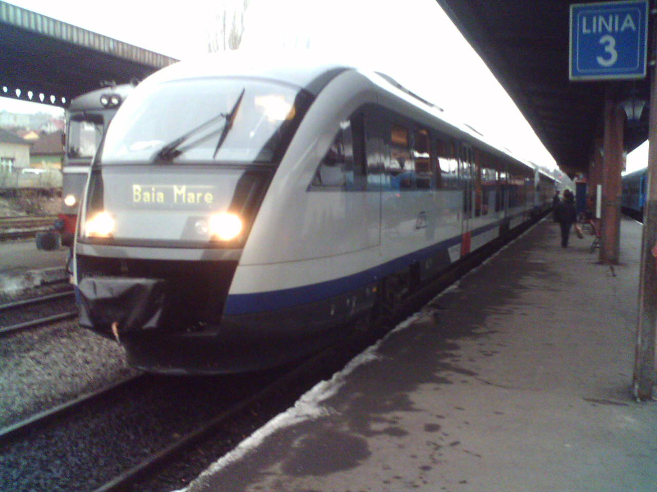 Siemens Desiro vonat a nagyváradi vasútállomáson. A felvétel a Sageata Albastra (Kék Nyíl) elnevezésű modern szerelvényt örökíti meg.